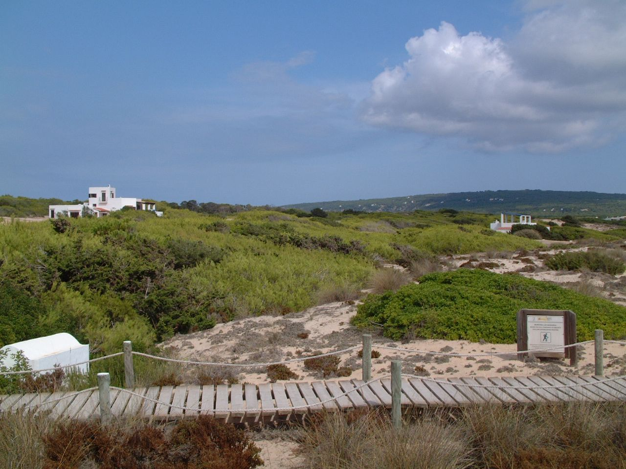 Dunes a la platja de Migjorn, Formentera